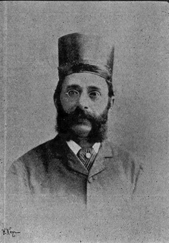 Sir Pherozeshah Mehta, KCIE (August 4, 1845 - November 5, 1915)